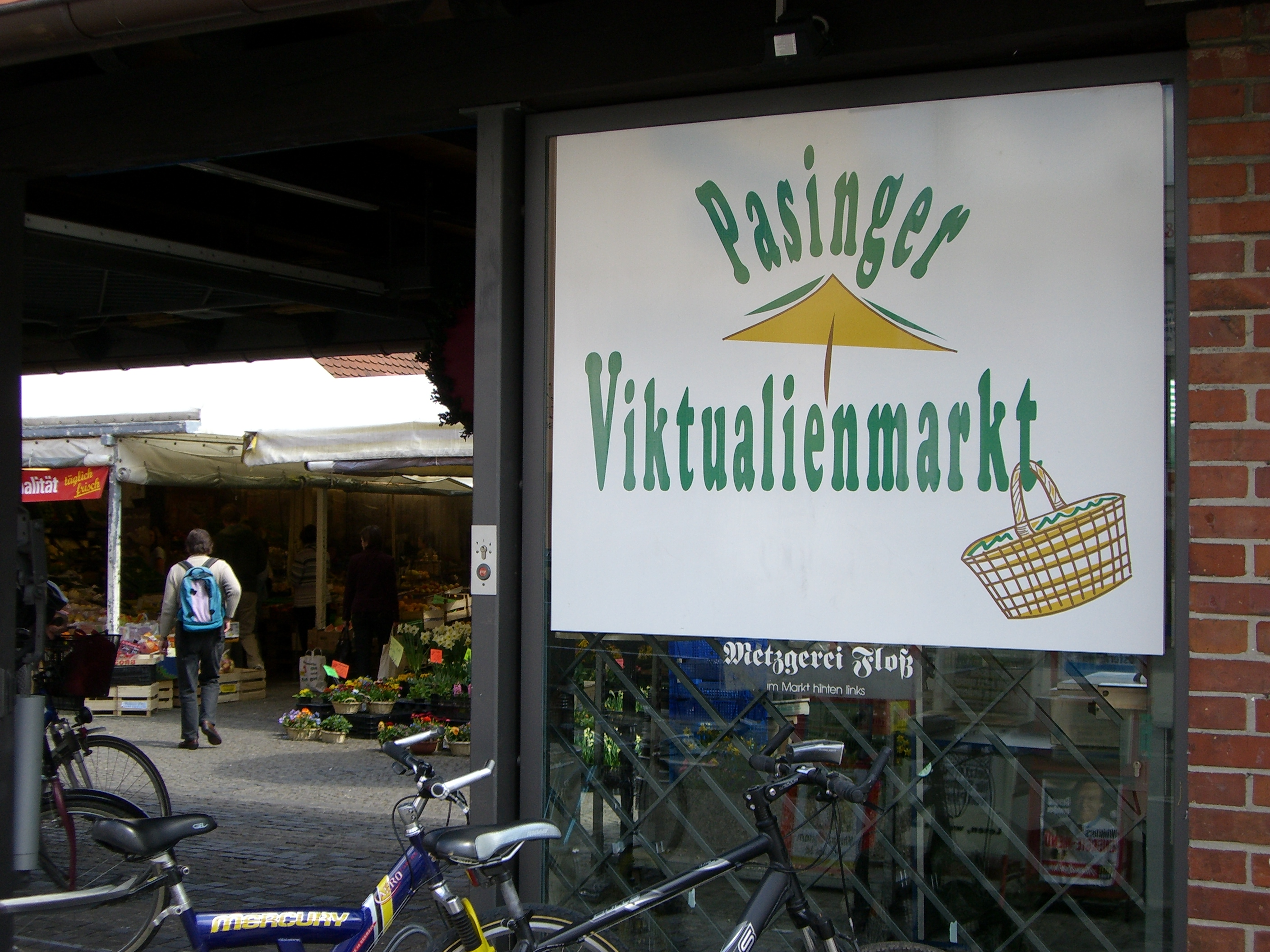 München: Pasinger Viktualienmarkt (Schild)